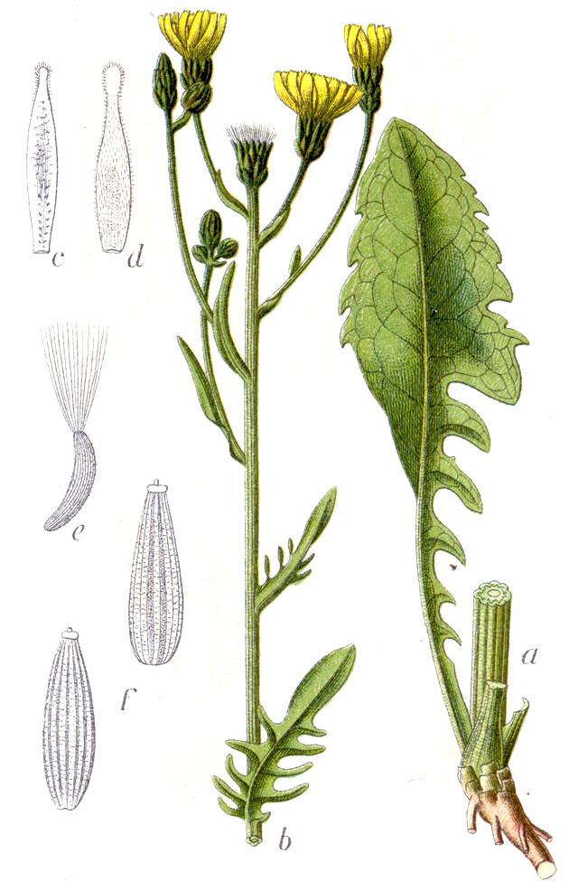 Crepis biennis L. Original Caption Grosse Grundfeste, Crepis biennis